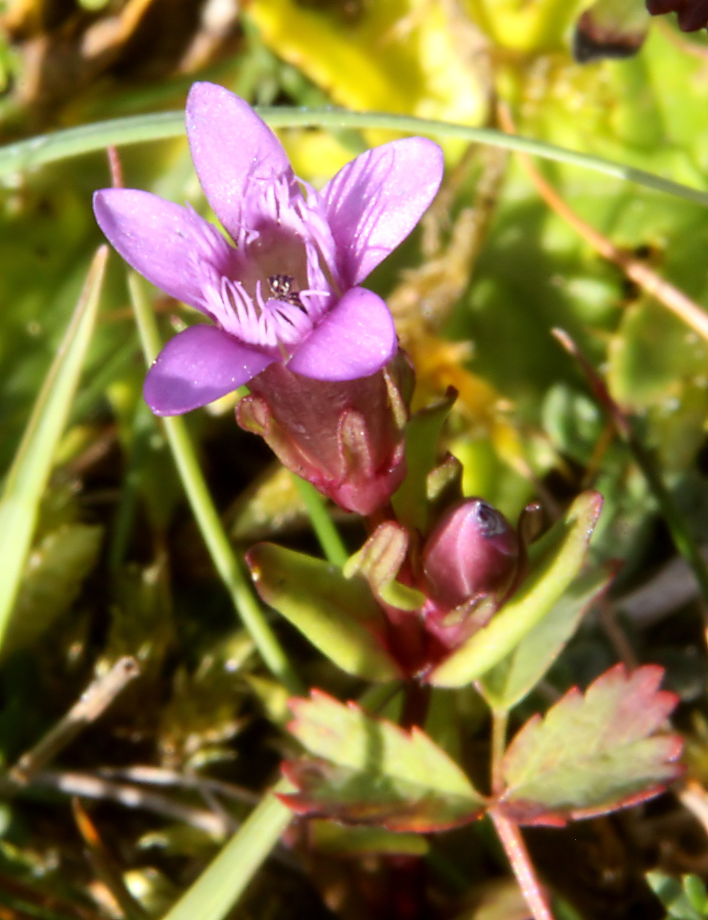 Autumn gentian, Gentianella amarella, Juniper Top, Mickleham.